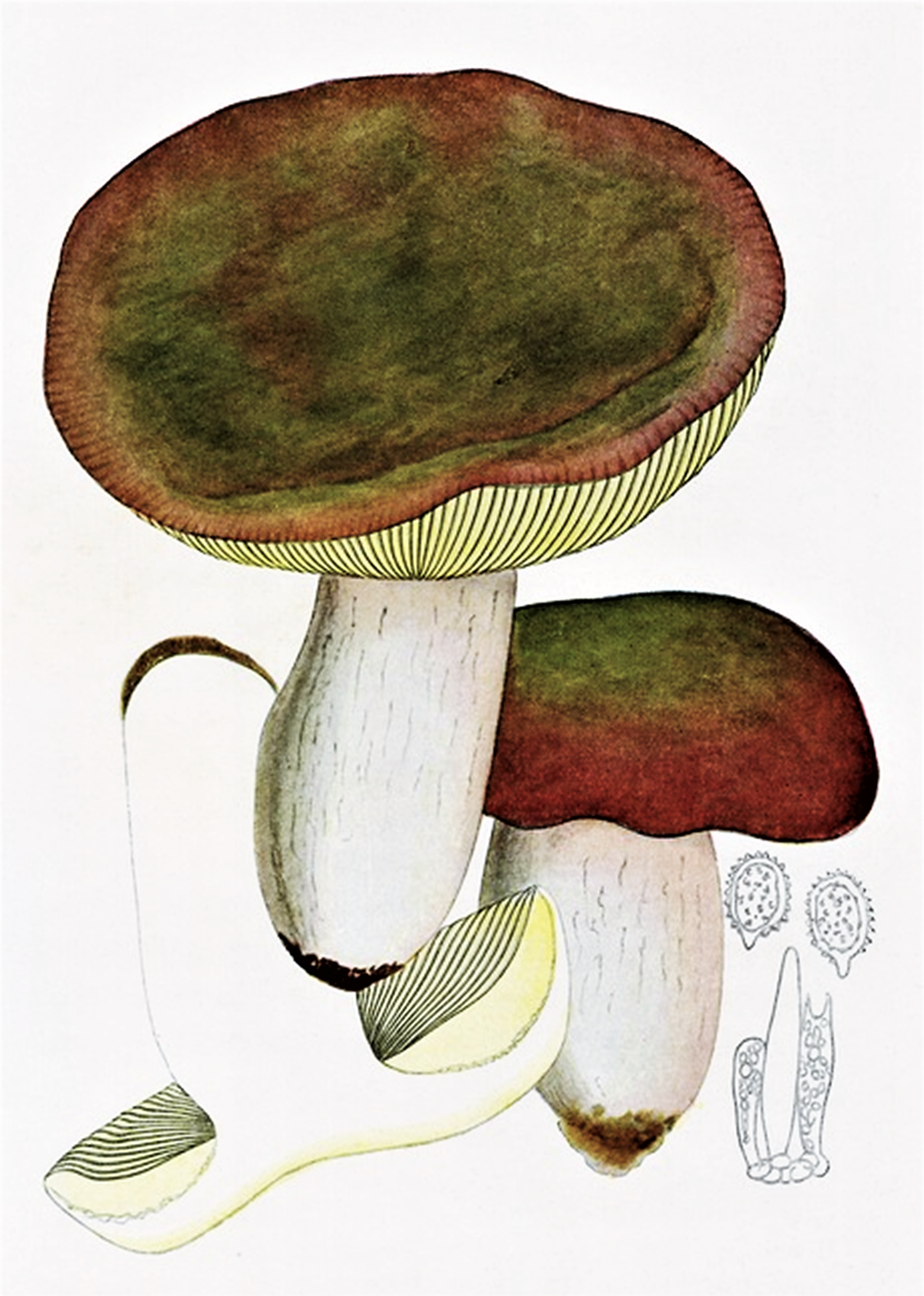 Giacomo Bresadola: Russula olivacea ((Schaeff.)) Fr. (1838)